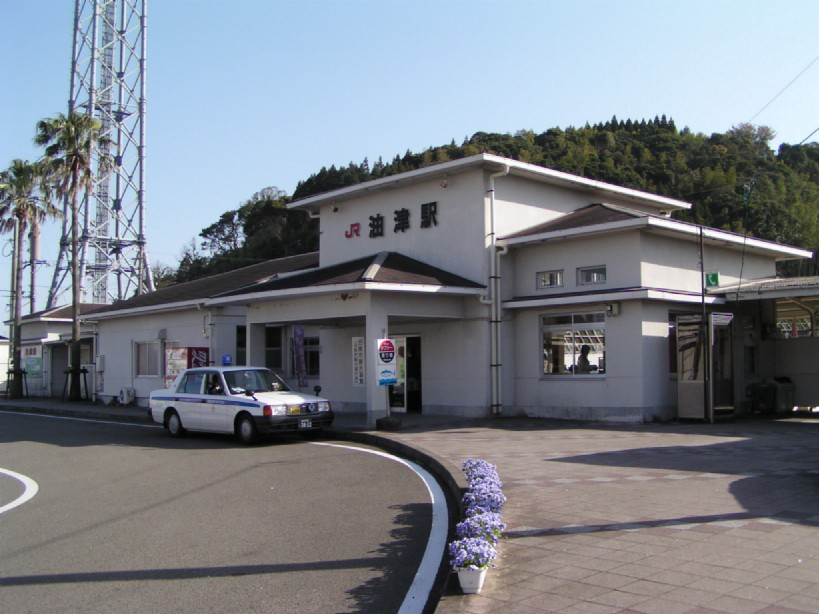 2005年3月30日に投稿者が油津駅にて撮影。